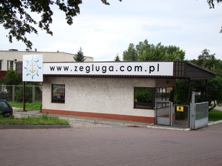 Dyspozytorka przy zajezdni.